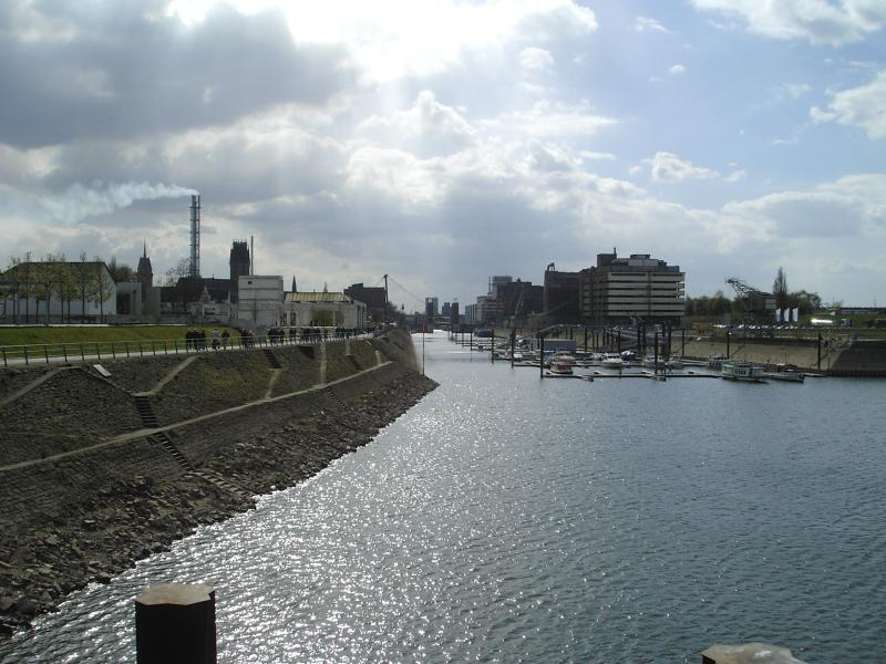 Le port de Duisburg Licence